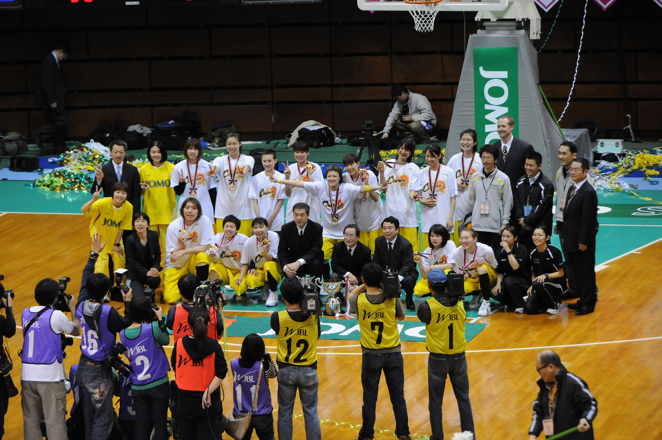 JOMOサンフラワーズ、代々木第二体育館で。